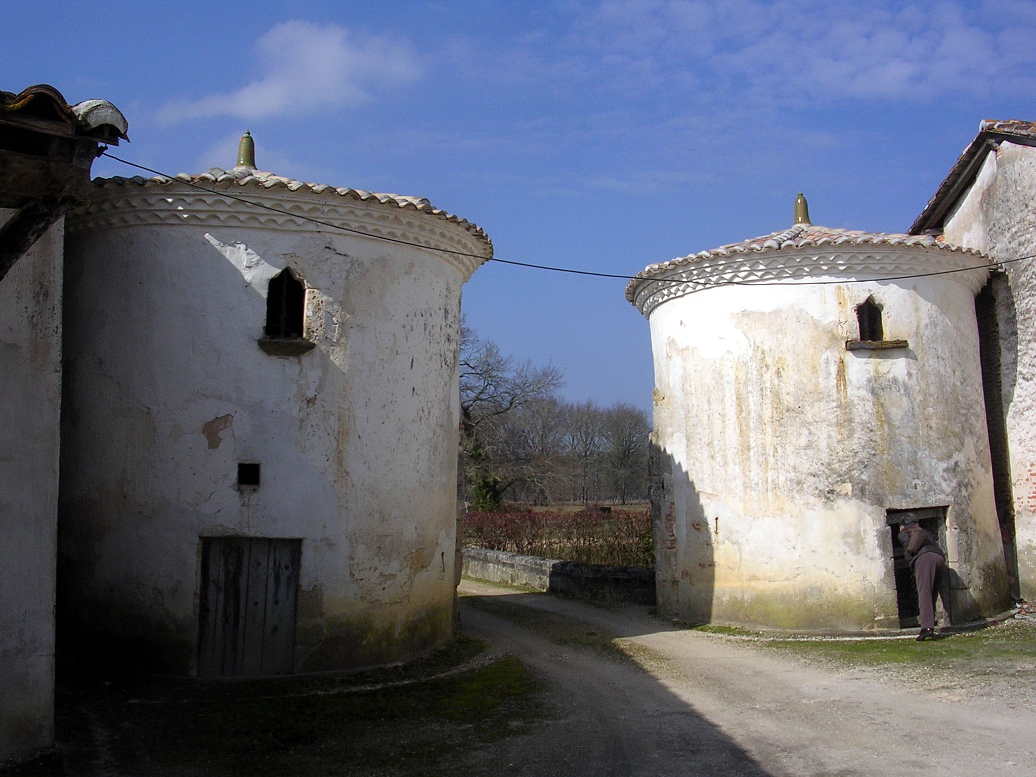 Château de Rochefort-Lavie, à Belhade